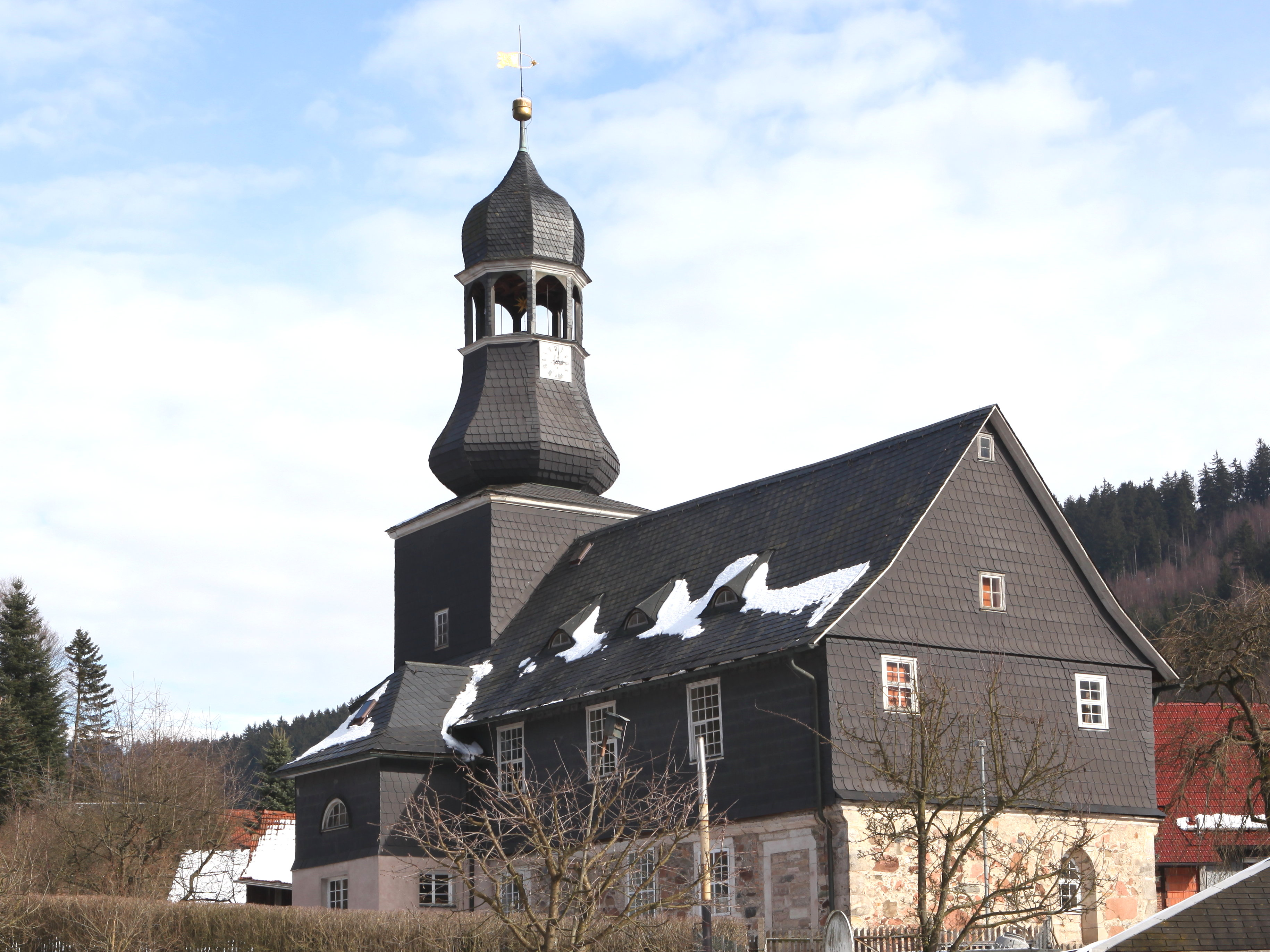 Evangelisch-Lutherische Kirche St. Jakobus in Schönbrunn, OT von Schhleusegrund, Landkreis Hildburghausen